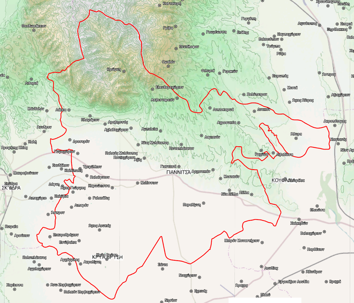 Τοπογραφικός χάρτης του Δήμου Πέλλας